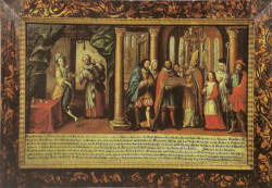 Die Geschichte der Margarete von Henneberg, Ölgemälde von Michael Waginger